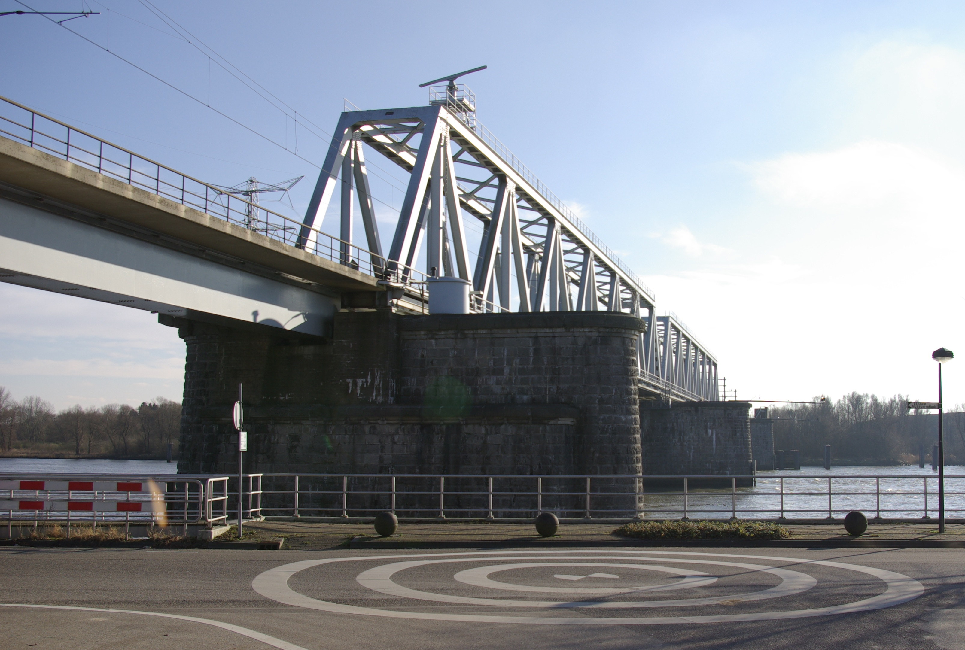 Baanhoekbrug